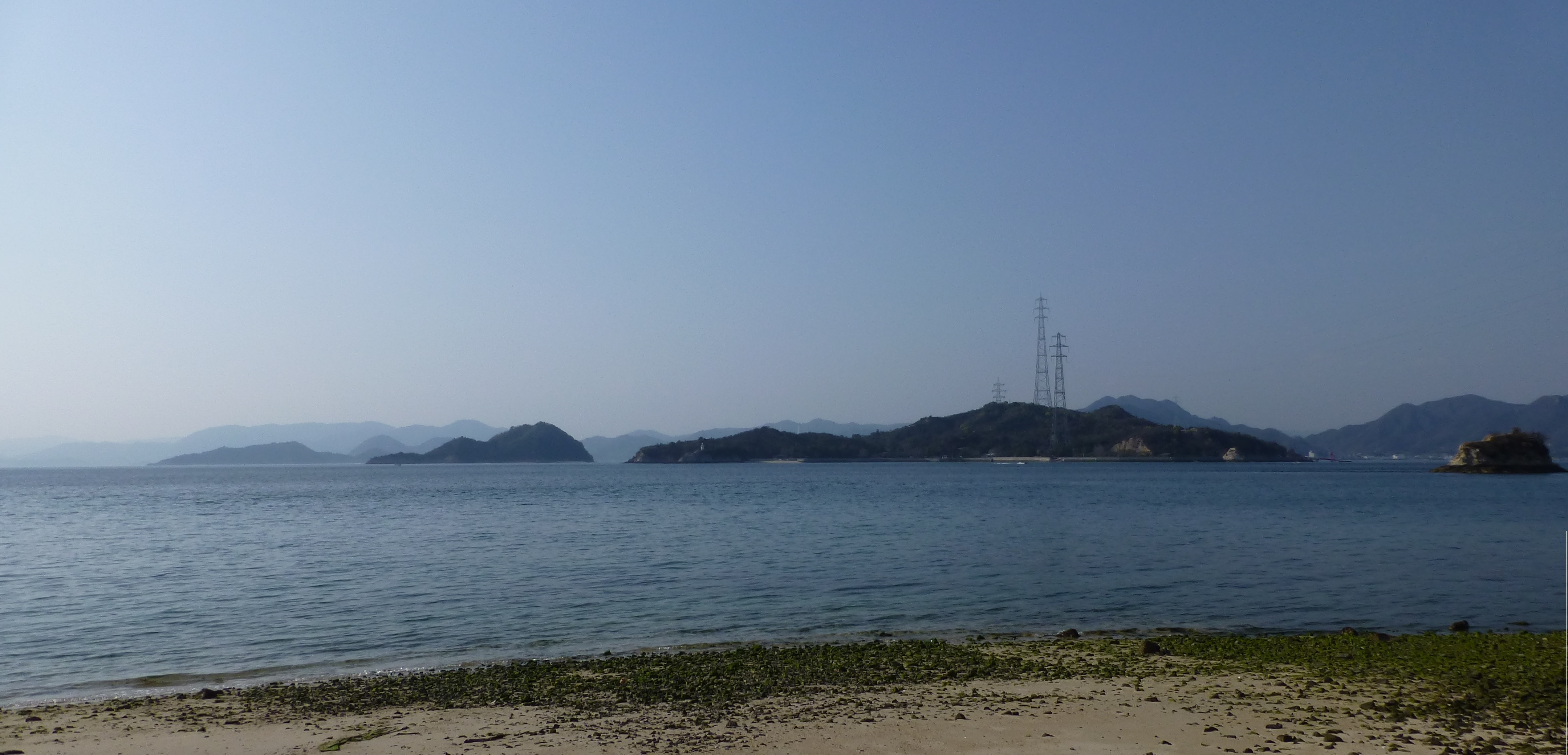 大久野島 2013年3月23日南南東2km大三島北岸から投稿者撮影